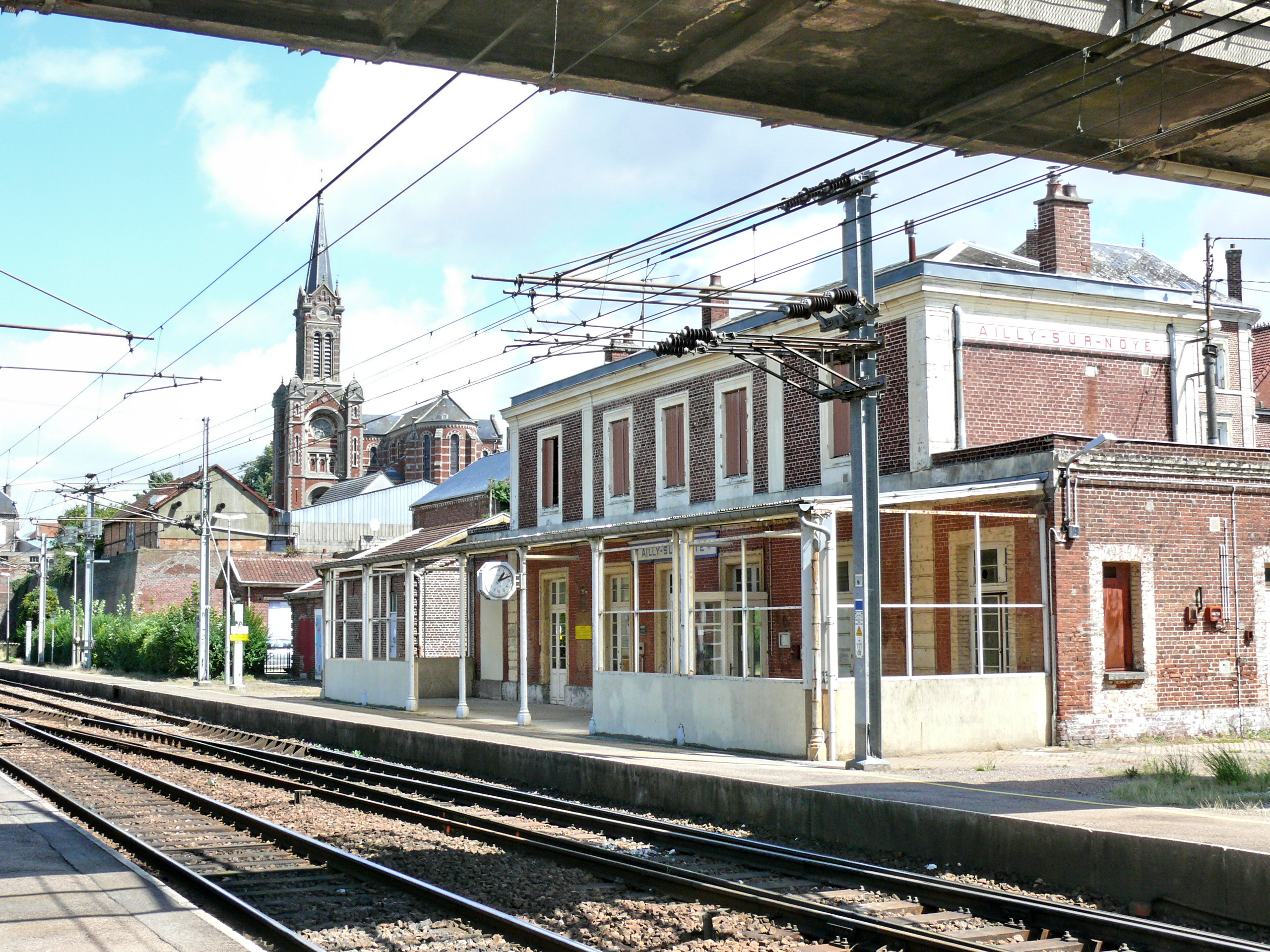 La Gare d'Ailly-sur-Noye surplombée par l'église Saint-Martin d'Ailly.